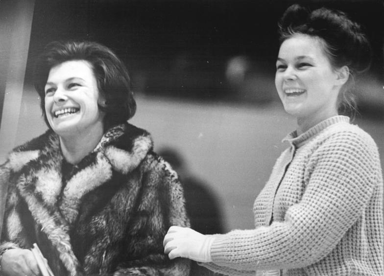 Gabriele Seyfert Zentralbild Kohls 10.1.1964 Deutsche Meisterschaften im Eiskunstlauf. Gemeinsame Freude über eine gute Wertung für die letzte Pflichtfigur hatten Gaby Seyfert und ihre Mutti am ersten Tag der deutschen Meisterschaft in der Berliner Werner-Seelenbinder-Halle. Gabriele Seyfert liegt nach dem Pflichtlaufen klar in Führung.